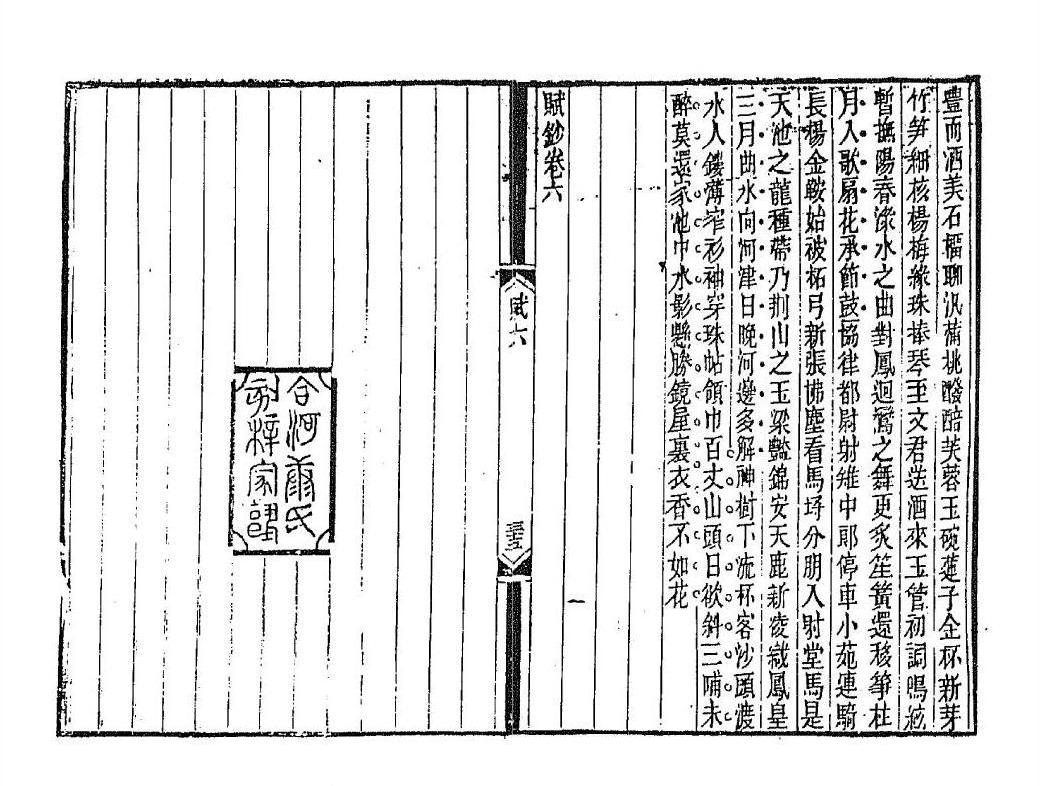 七十家賦鈔, Qishijia Fuchao（Collection of Poems by Seventy Poets）